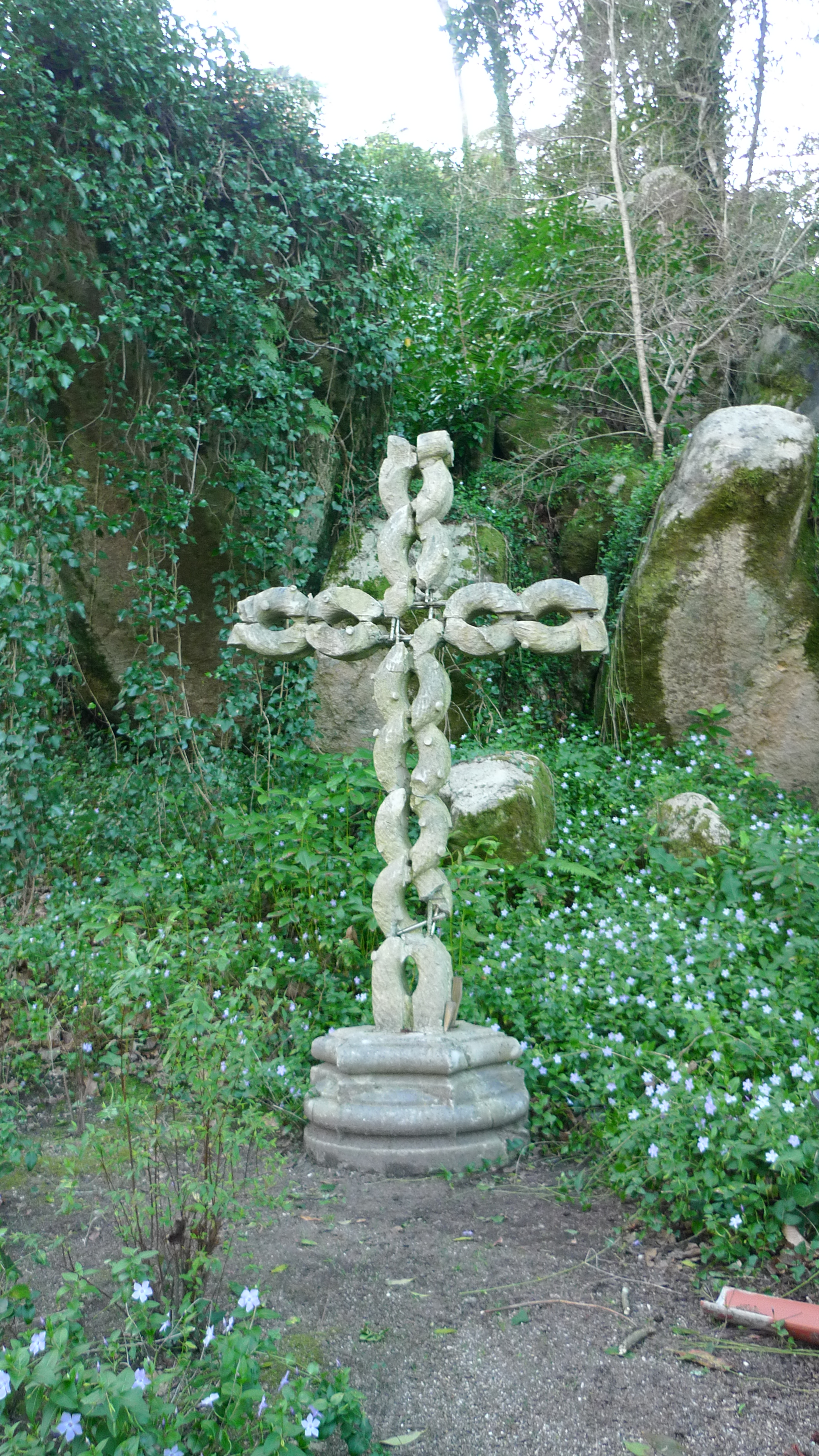 L1190294